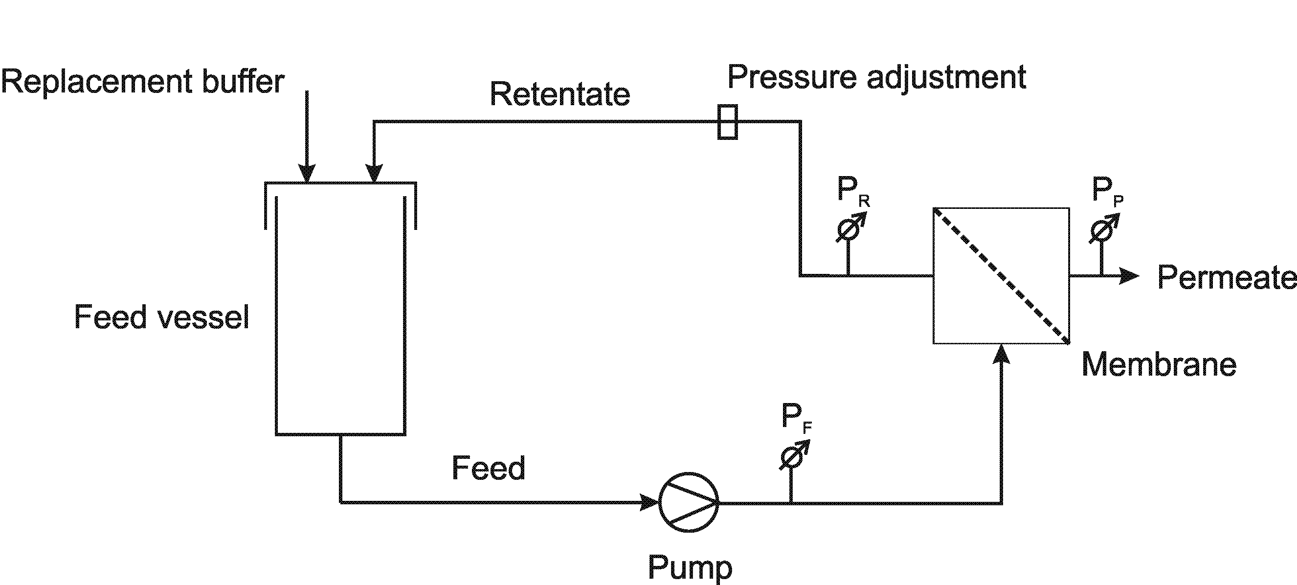 Skizze einer Diafiltrationsanlage, die schematisch alle benoetigten Bauteile darstellt.